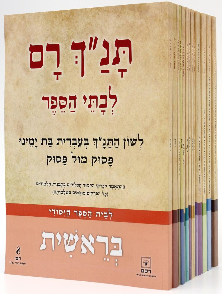 ספרוני he:תנ"ך רם